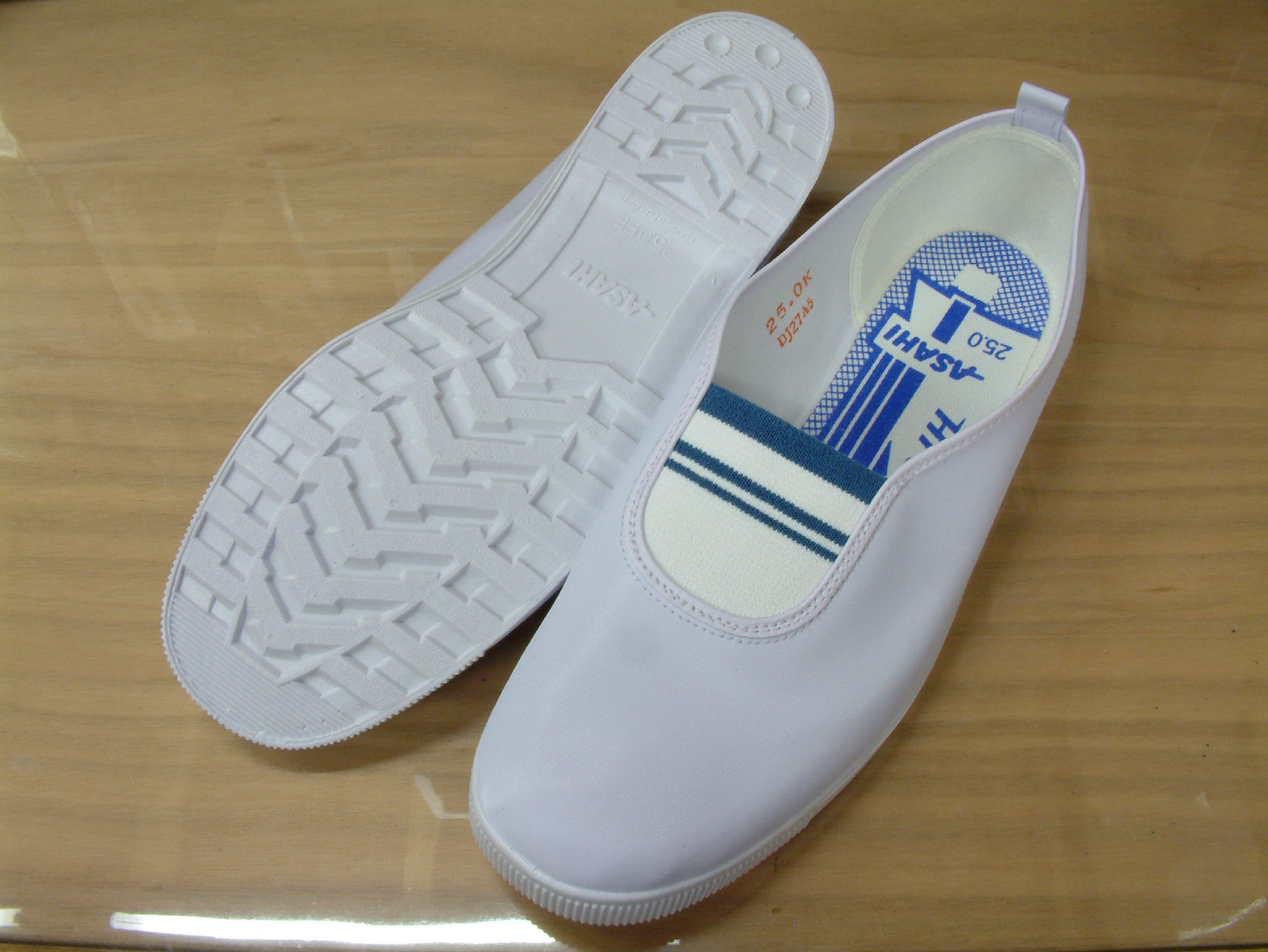 アサヒ ハイゼクトスクールＫ(KC31011)25.0cm 白